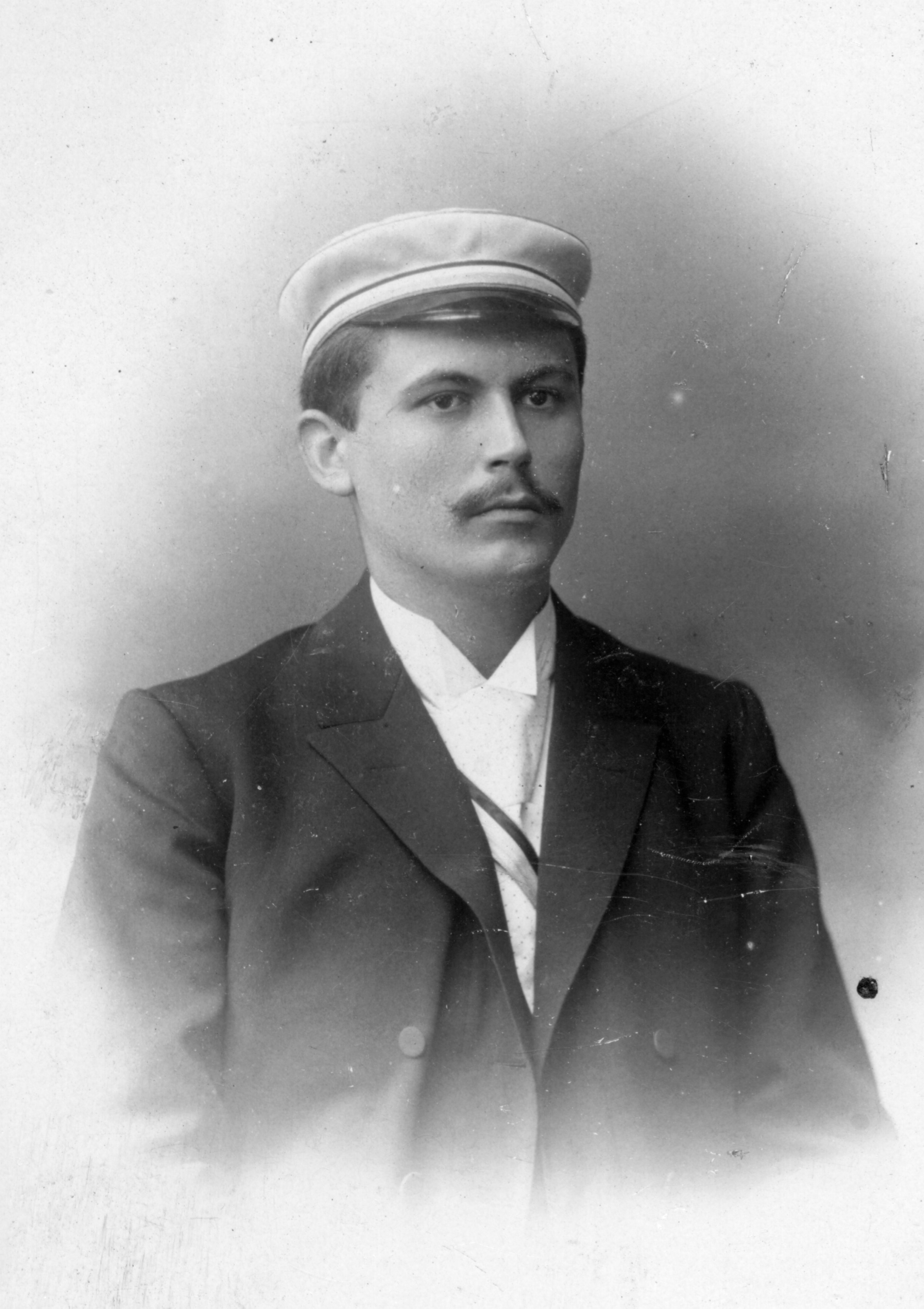 Couleurfoto von Karl Hermann Zipp